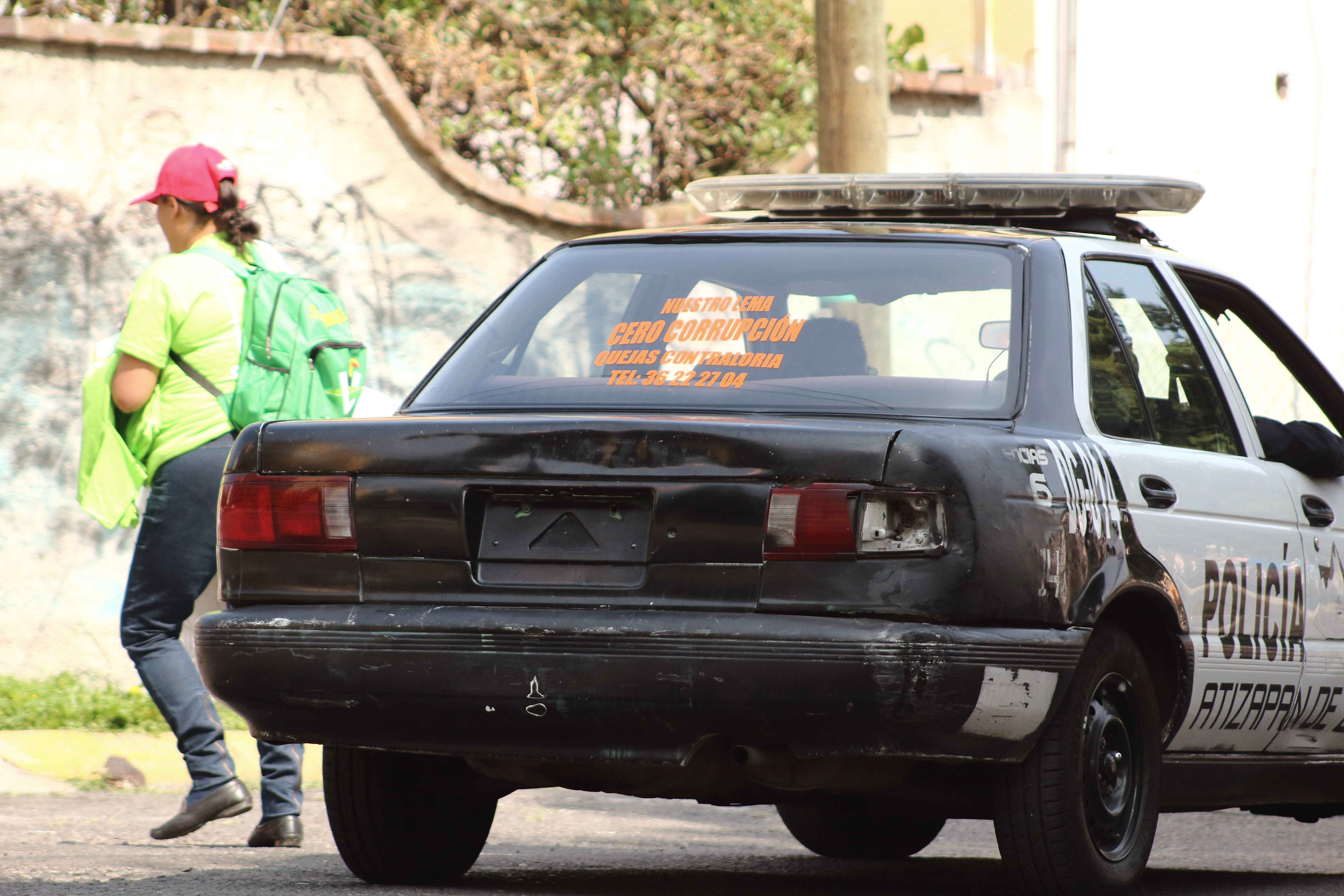 "Cero corrupción" y mal estado de las patrullas del municipio.